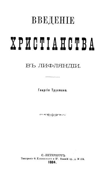 Truusmann, Jüri, magistritöö Введение христианства в Лифляндии, esikaas, 1884.